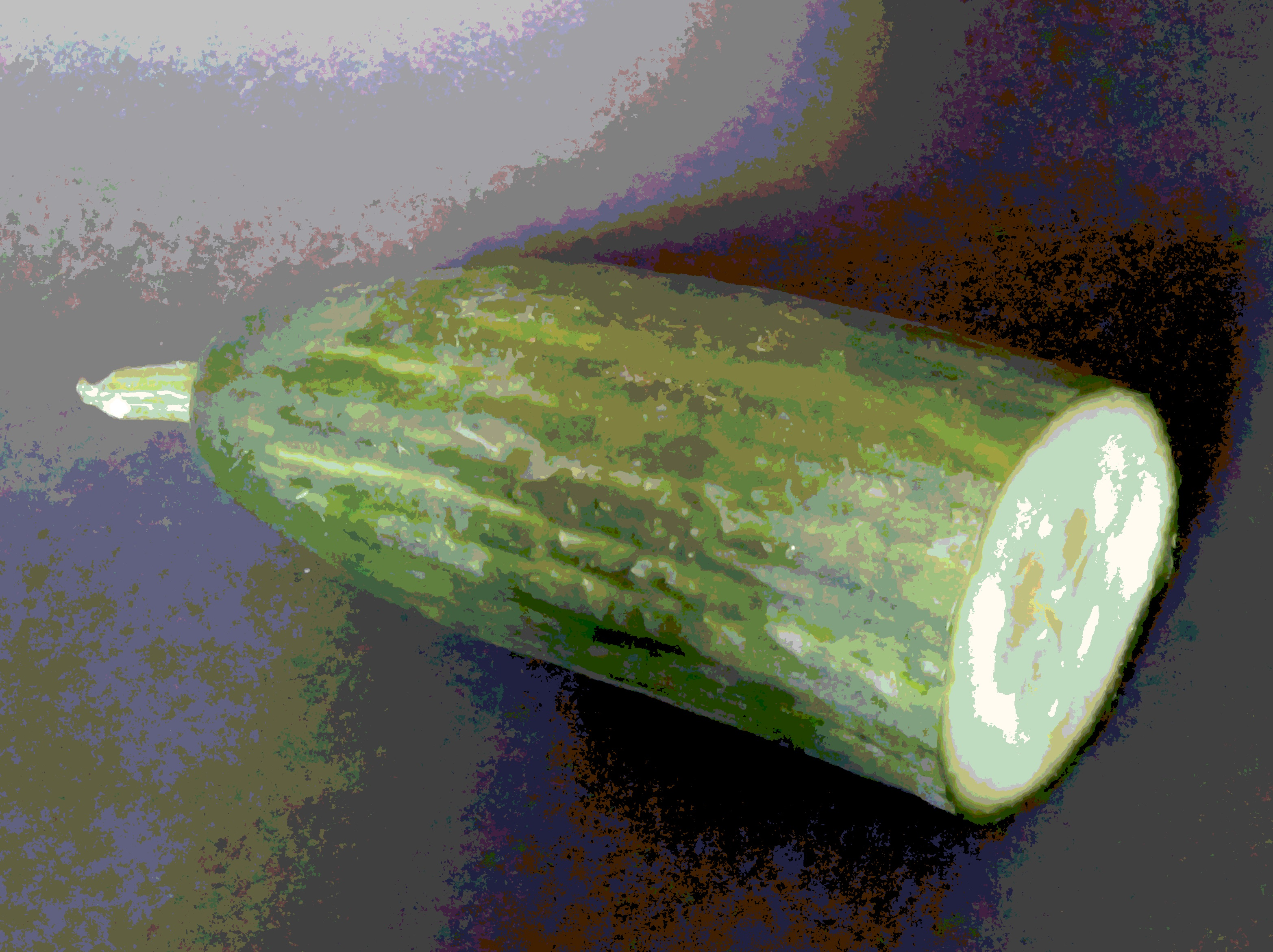 jpeg muodossa tallennettu 256 värinen bmp kuva